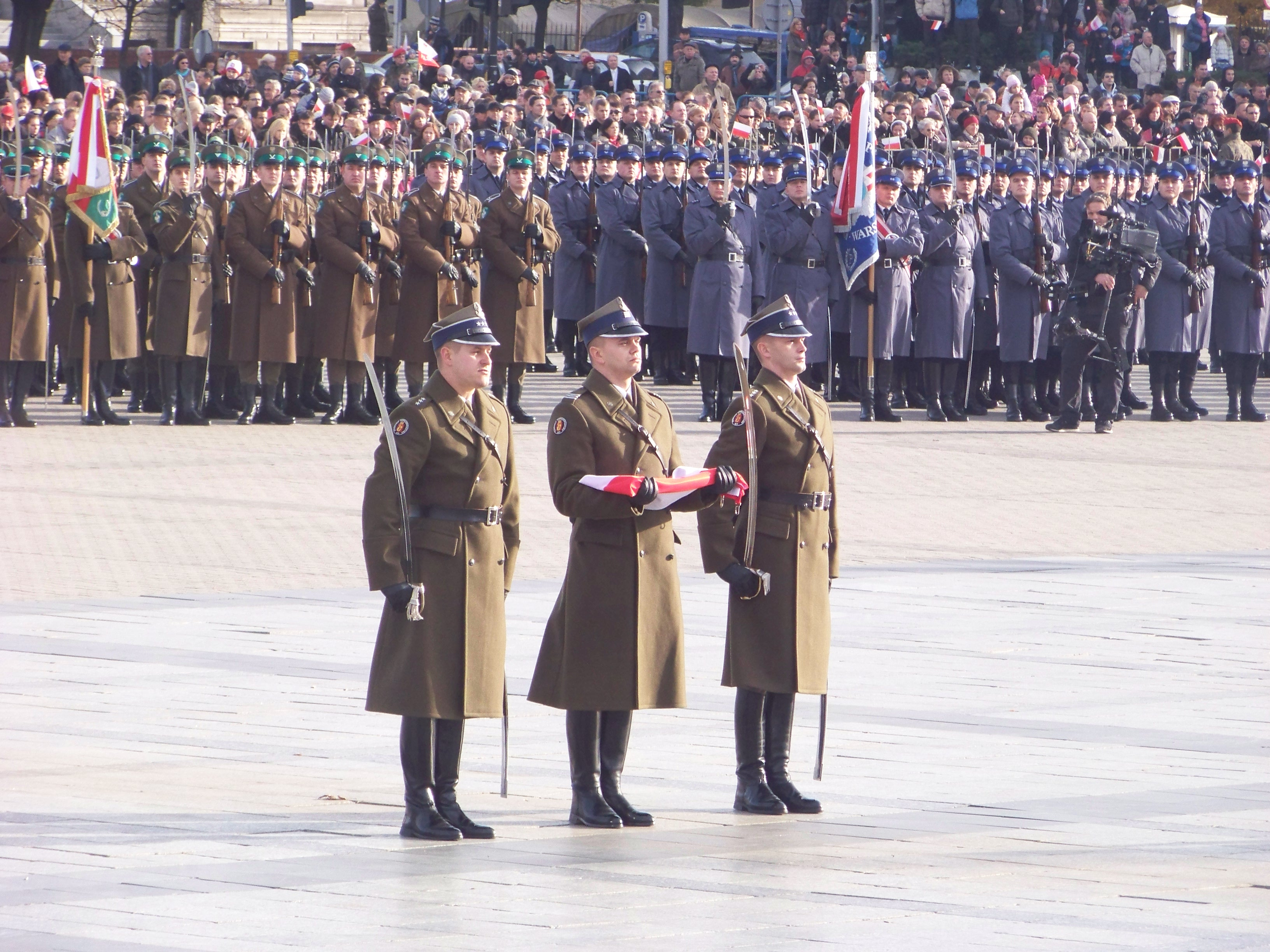 Święto Niepodległości